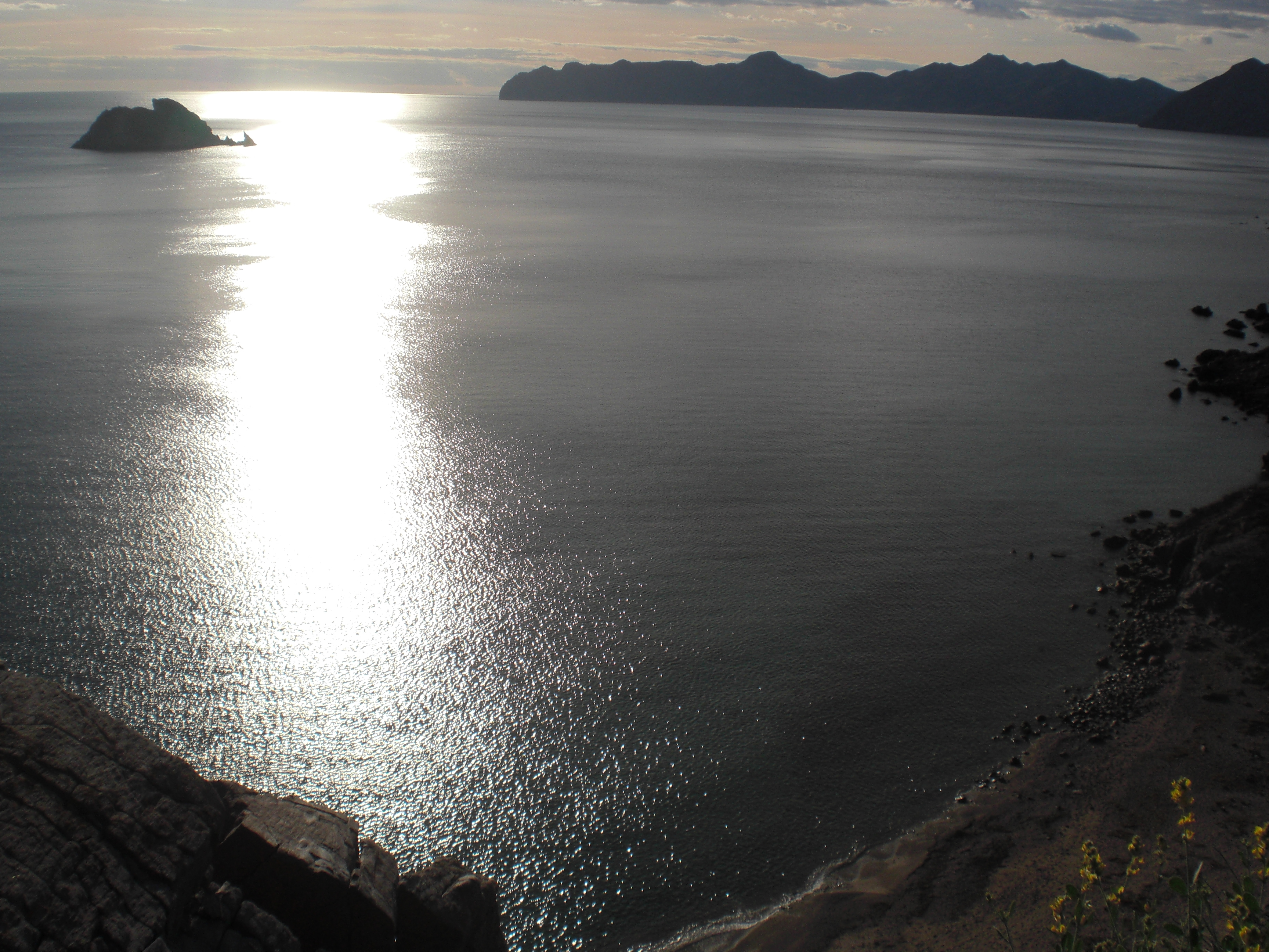 Isla de las Palomas, Cabo Tiñoso y parte de la playa de Fatares, desde una colina sobre la playa, Cartagena